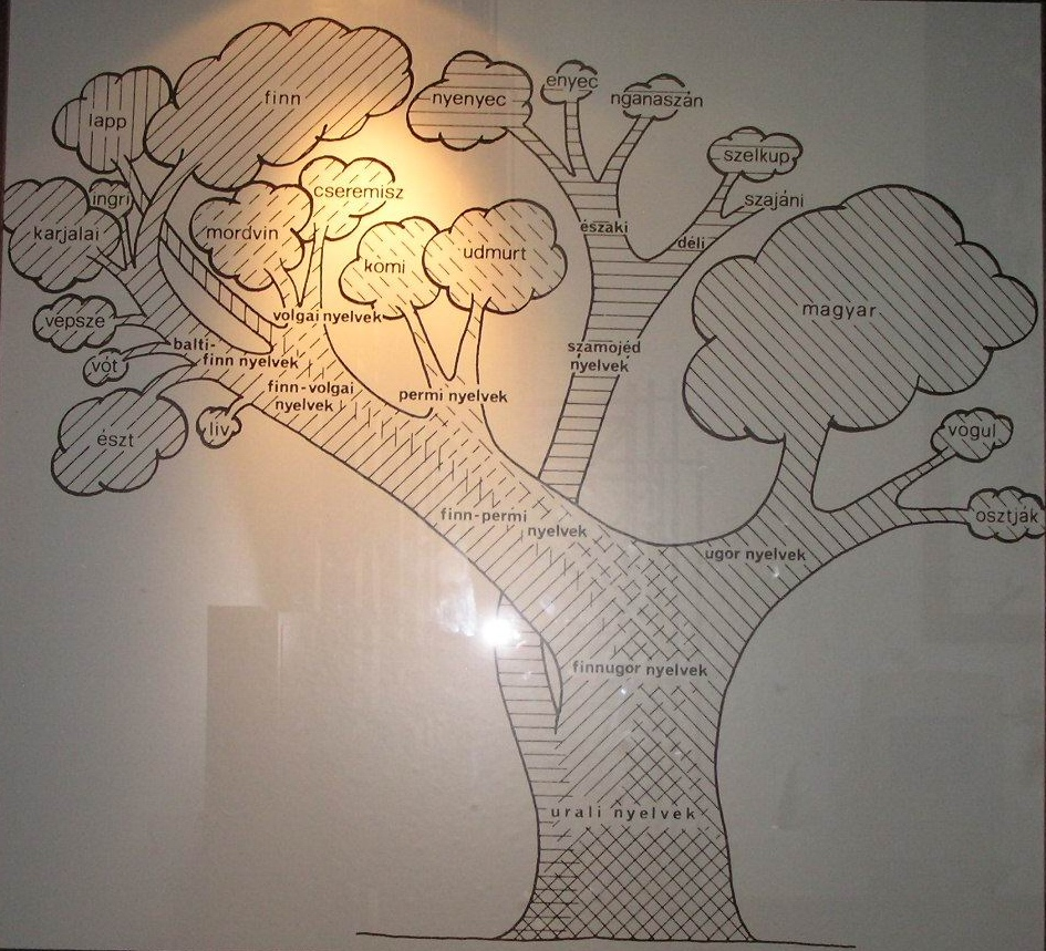 Genealogische Tafel der Verwandtschaft zwischen Magyaren und Finnen.